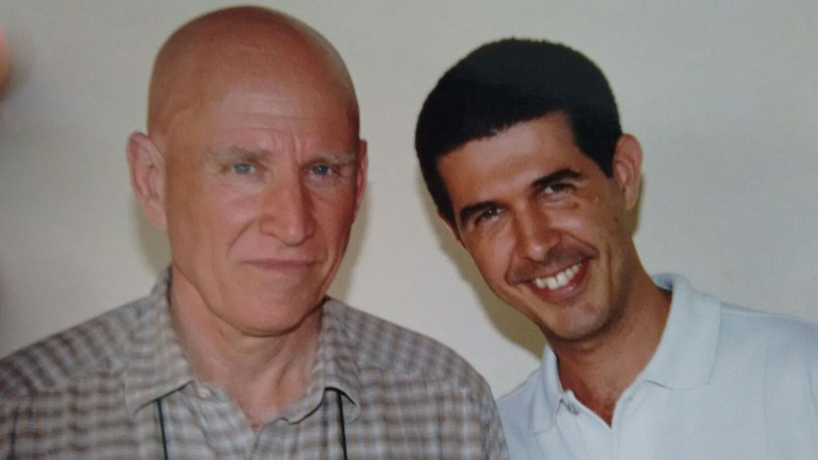 Fotógrafo Sebastião Salgado e seu Aluno André